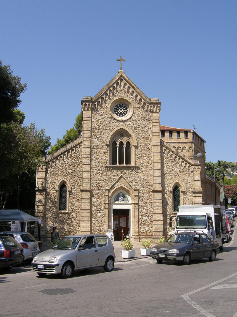 Vasto